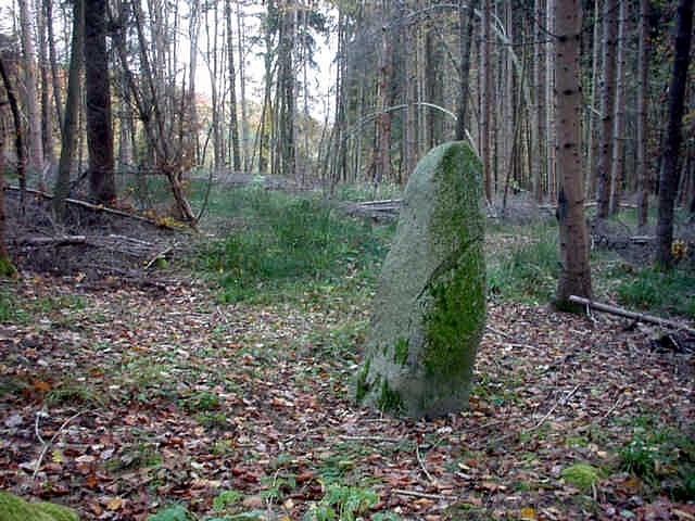 Hunnenstein - Niederdossenbach - Baden-Württemberg - Deutschland